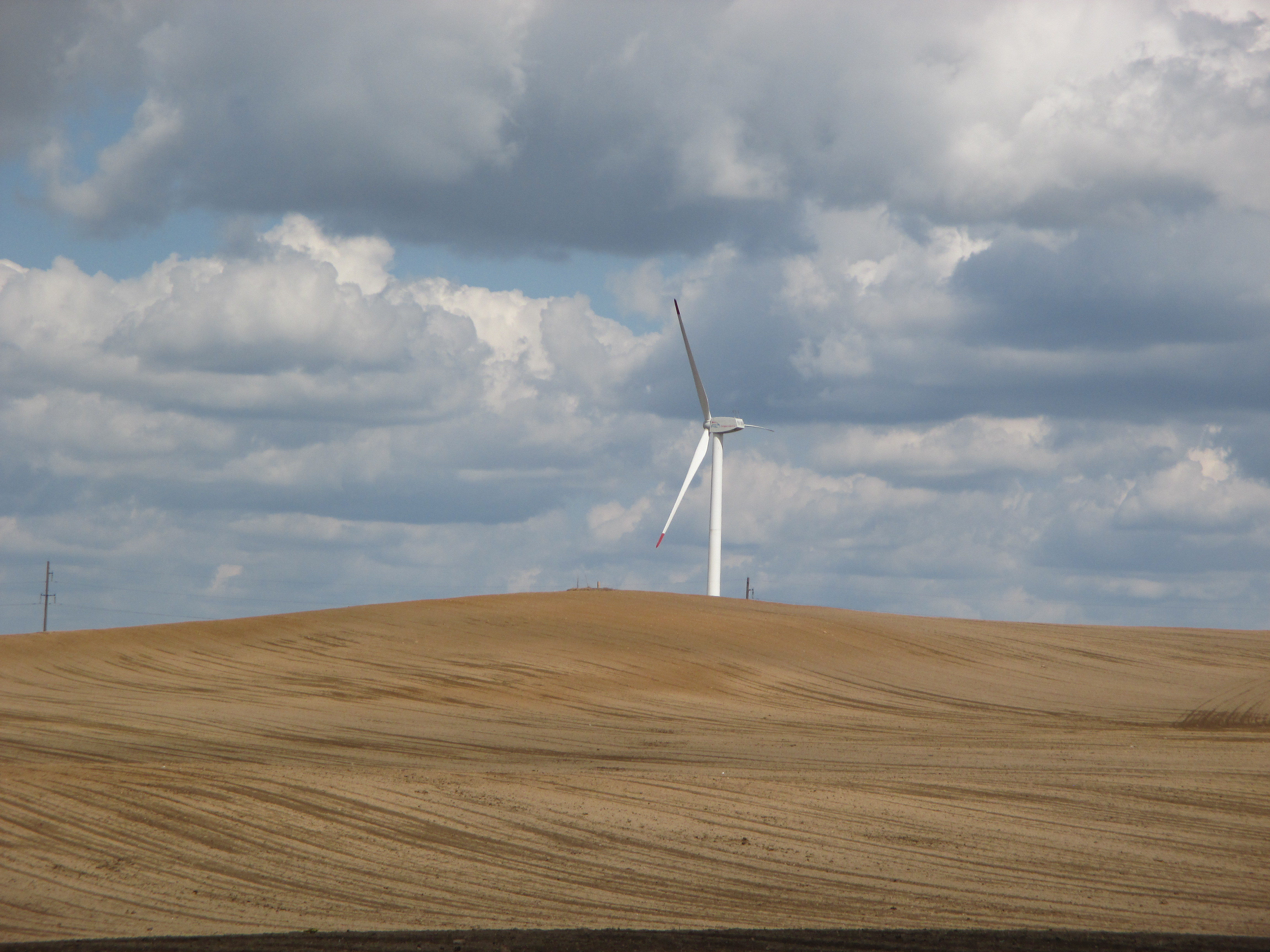 Гара Замкавая, Пуцэвічы, выгляд з боку вёскі